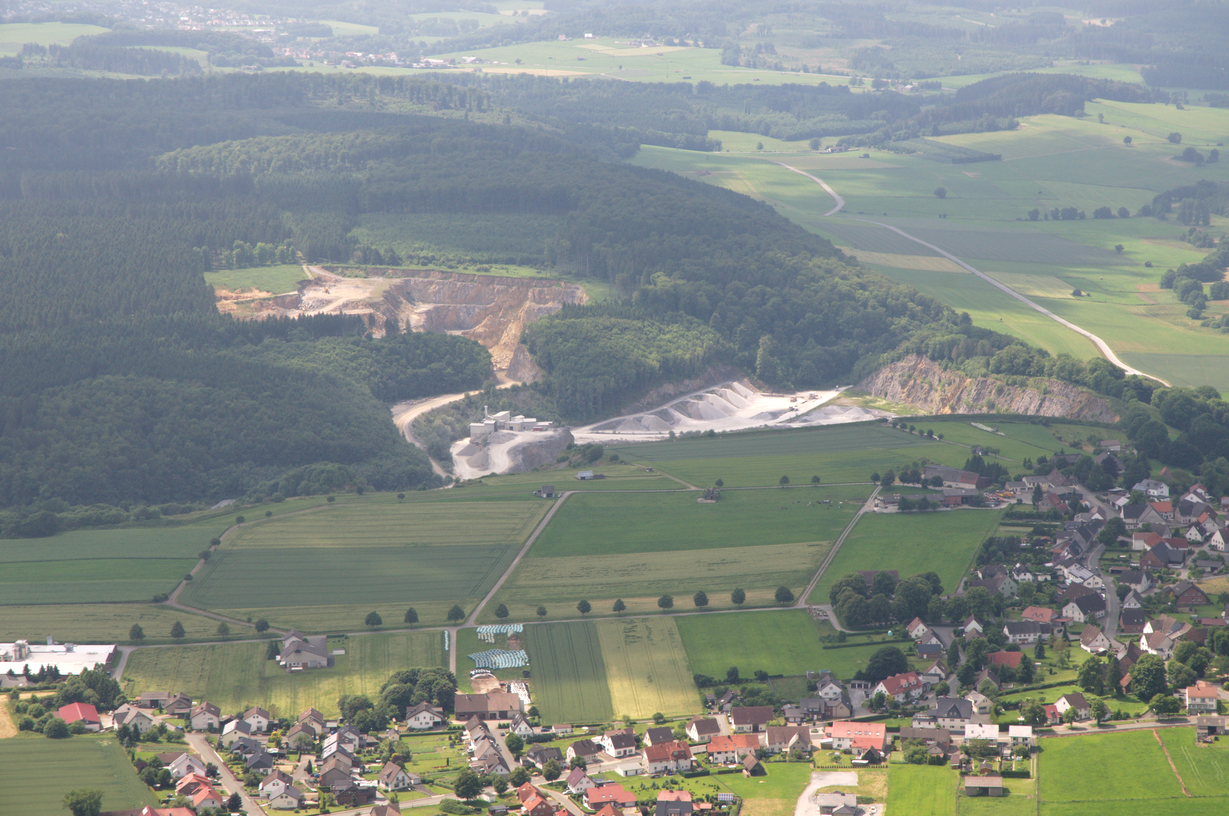 Luftaufnahme von Bleiwäsche (im Rahmen des Fotoflugs Sauerland-Ost) The making of this document was supported by the Community-Budget of Wikimedia Germany.